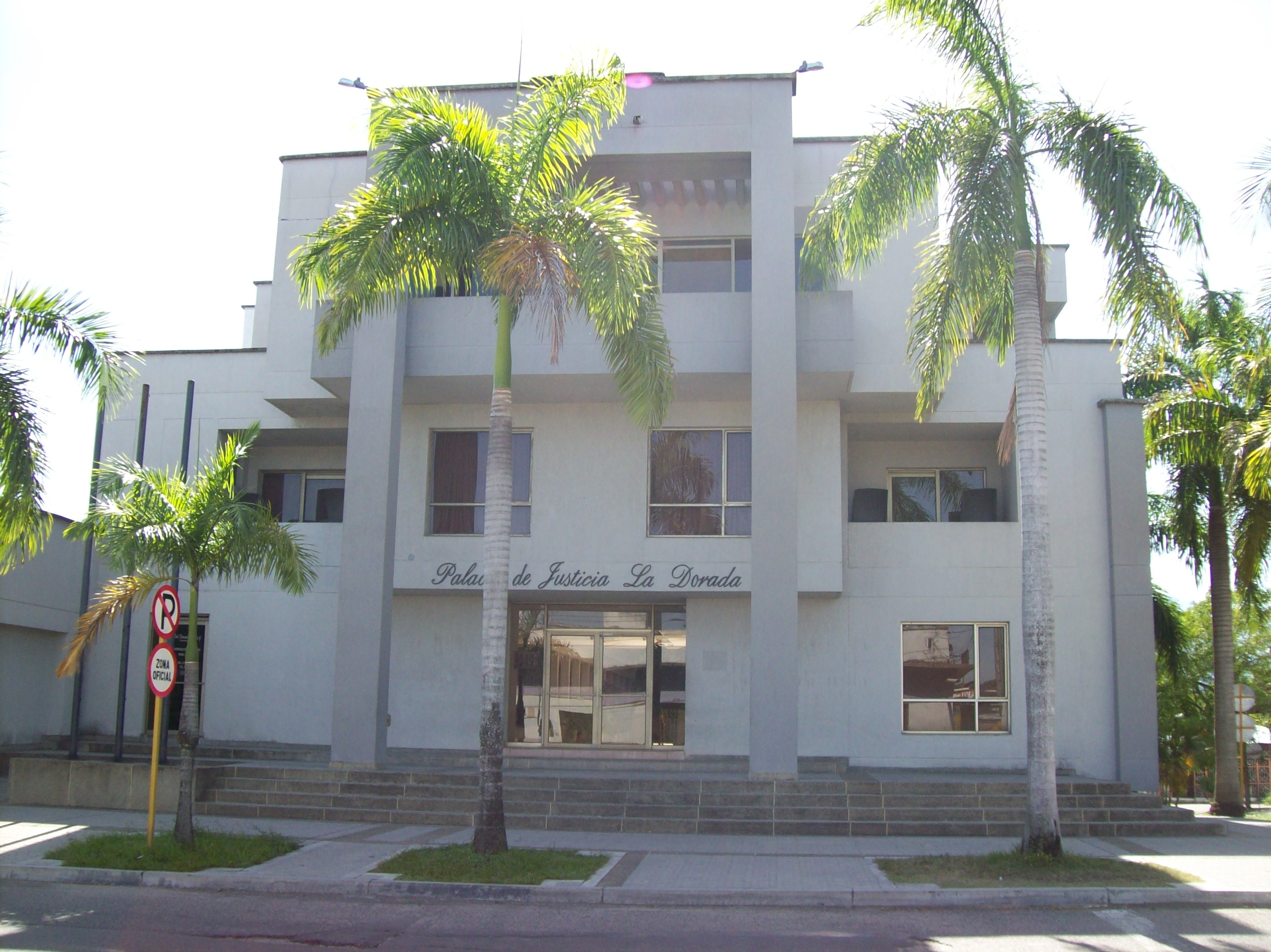 Fachada principal del Palacio de Justicia La Dorada.